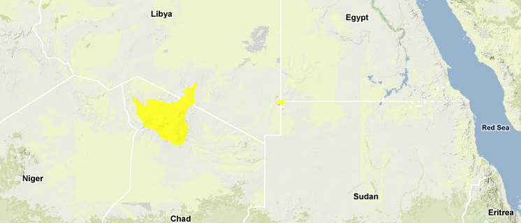 Mappa Ecoregione PA1331 - Boscaglie xerofile montane del Tibesti-Jebel Uweinat